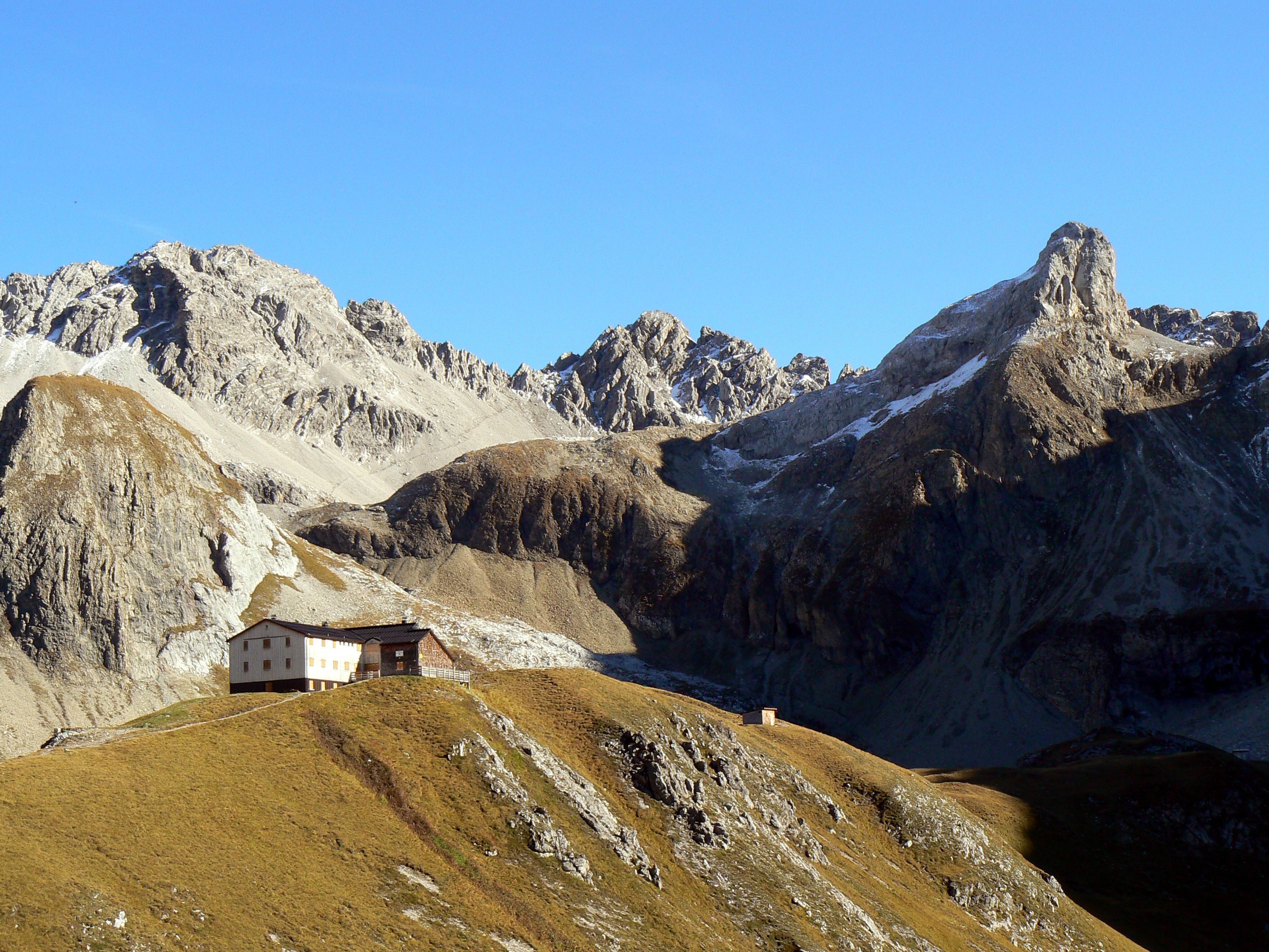 Die Memminger Hütte des DAV mit Seeköpfel